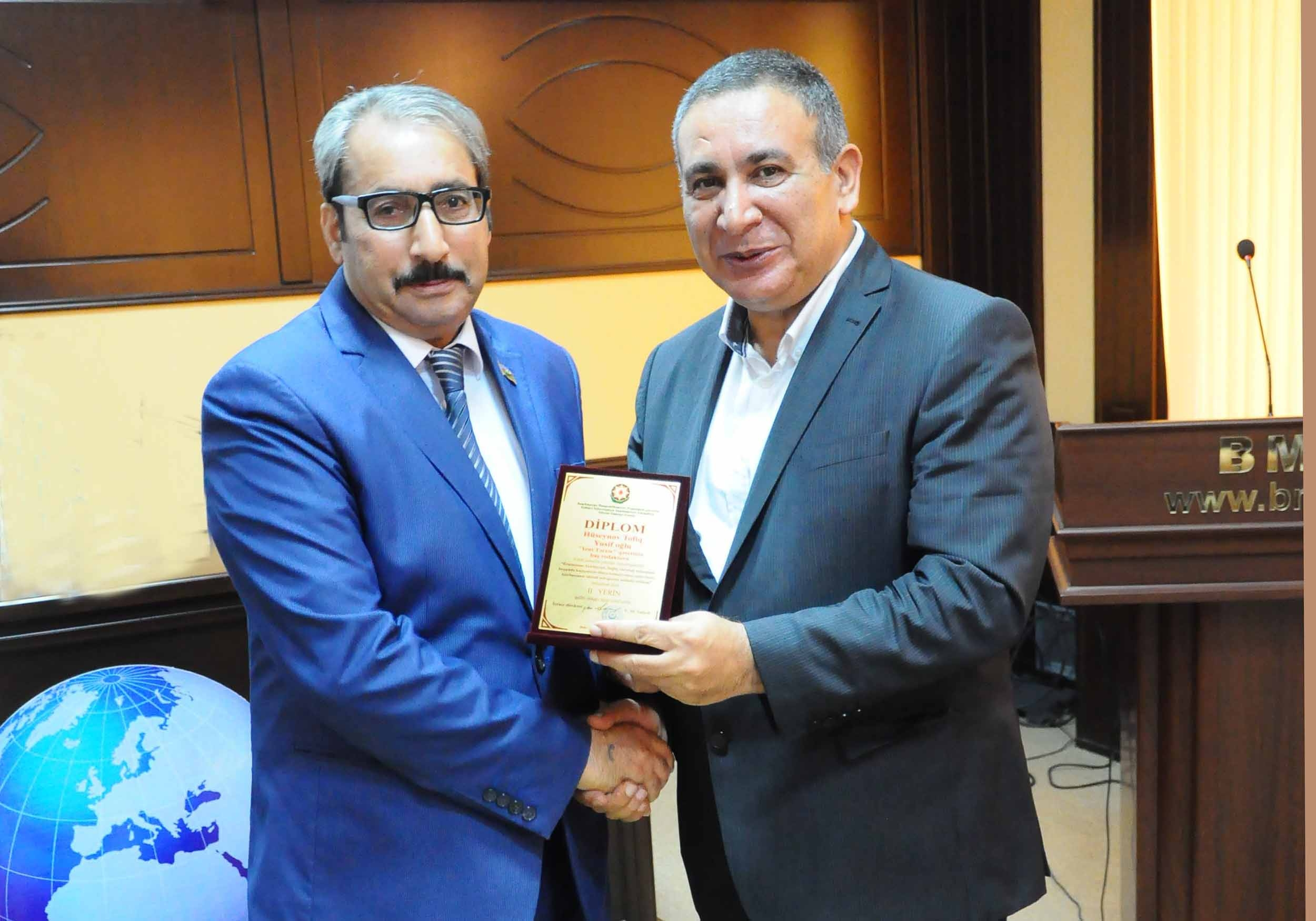 Tofiq Yusif və Rəşad Məcid